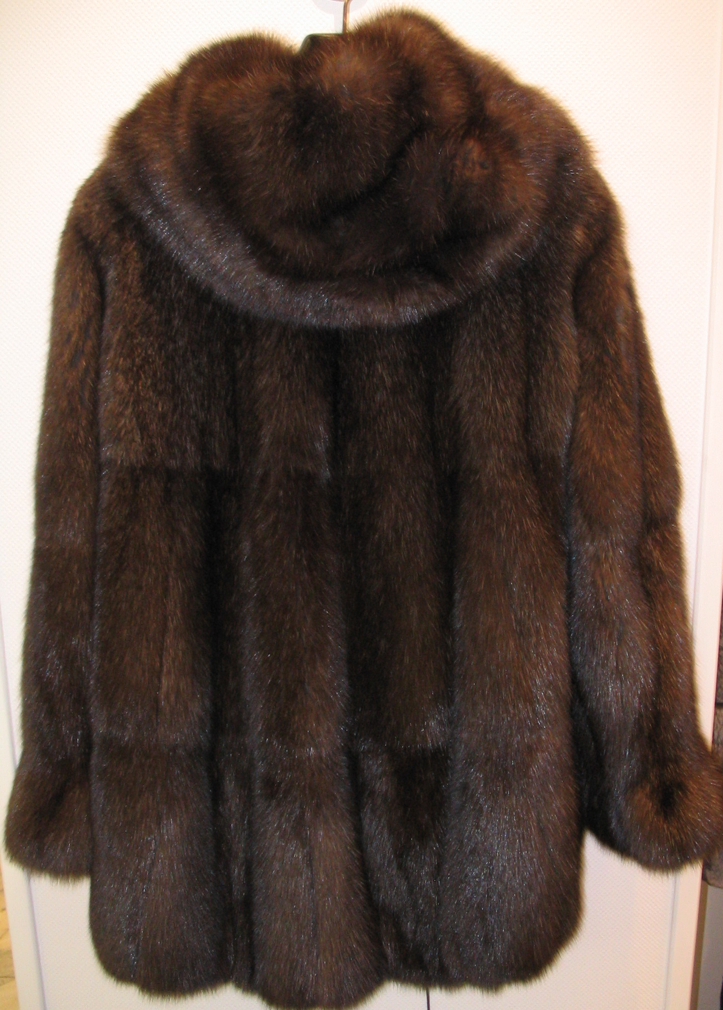 Bargusin Zobeljacke Gesehen bei Slupinski, Düsseldorf, Königsallee 92